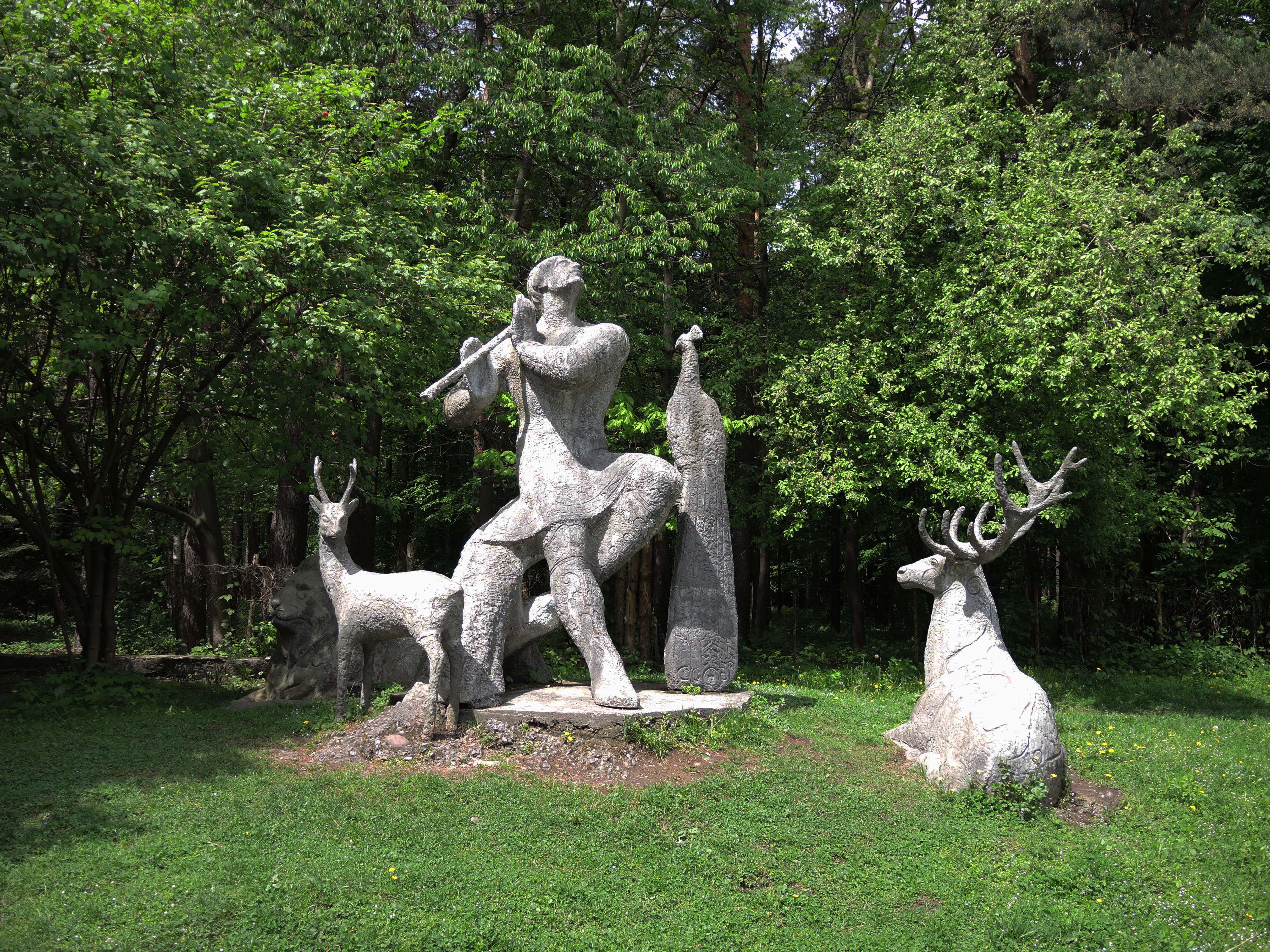 Владикавказский дендрарий: к юго-западу от города, у подножья Лысой горы, Владикавказ, Северная Осетия This image is related to the protected area of Russia number 1510150